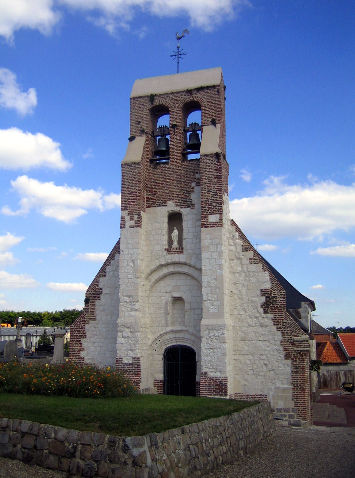 Pont-de-Metz (Somme, France) - L'église Saint-Cyr et Sainte-Julitte. . .